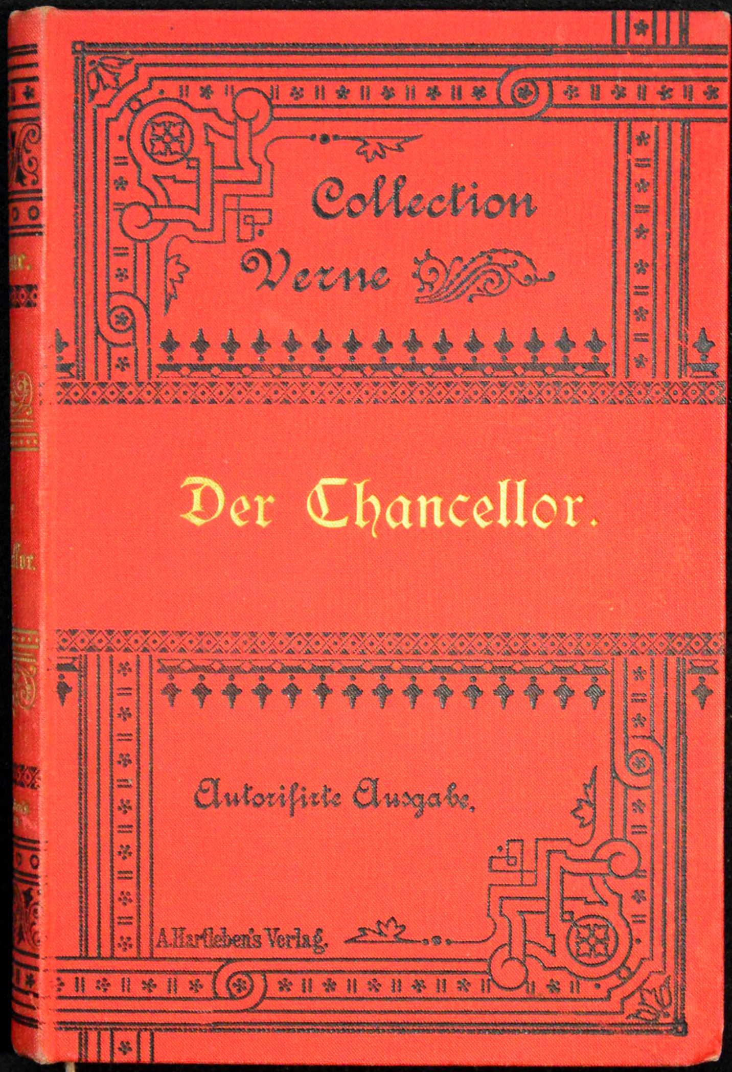 Julius Verne: Der Chancellor. Tagebuch des Passagier [sic!] J. R. Kazallon